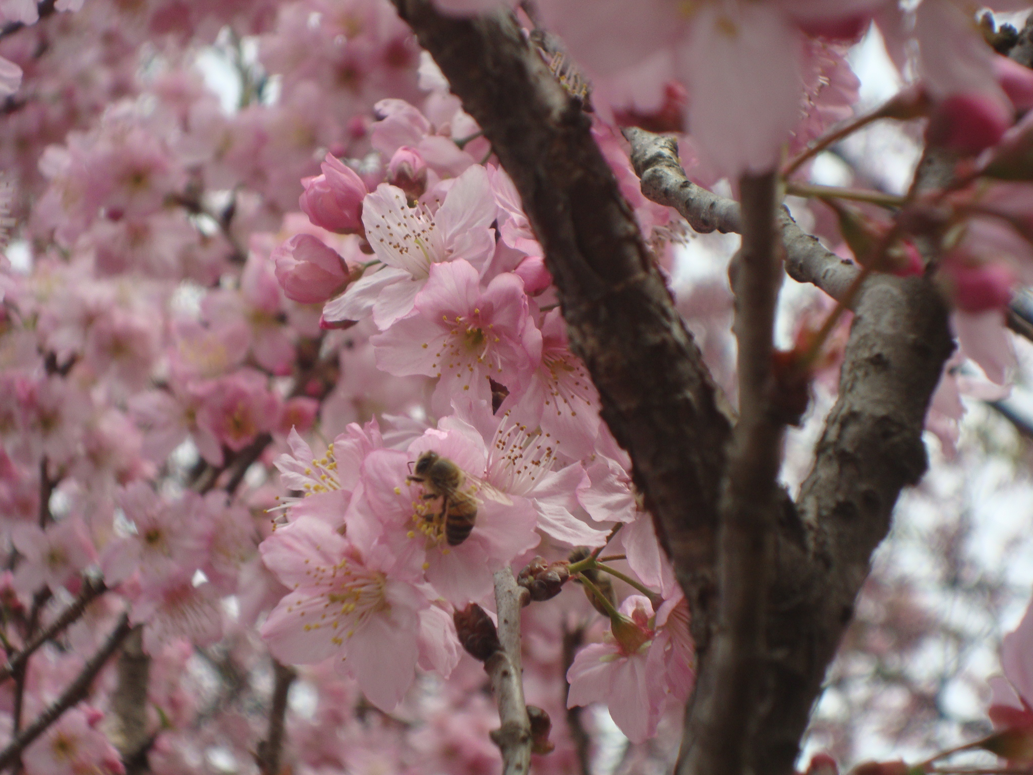 Cerejeira, flor de curta duração, em São Paulo é encontrada no Pq. das Cerejeiras Z. Leste